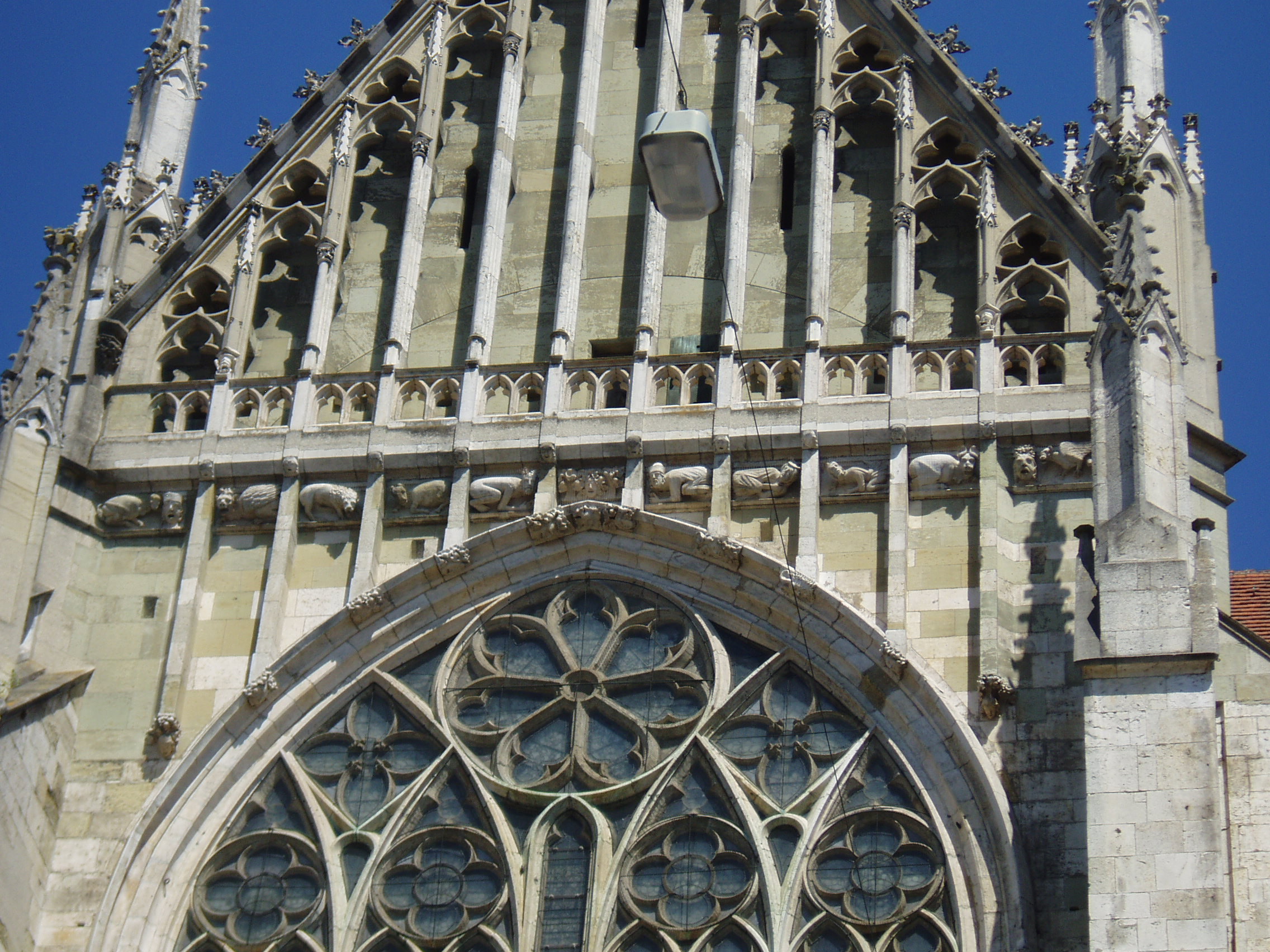 Südquerhaus, Fries unter dem Giebelansatz. Um 1310/1315. Ref.: A. Huber, M. Schuller: Der Dom zu Regensburg. Regensburg, 1995. ISBN 3-7917-1449-X. S. 46